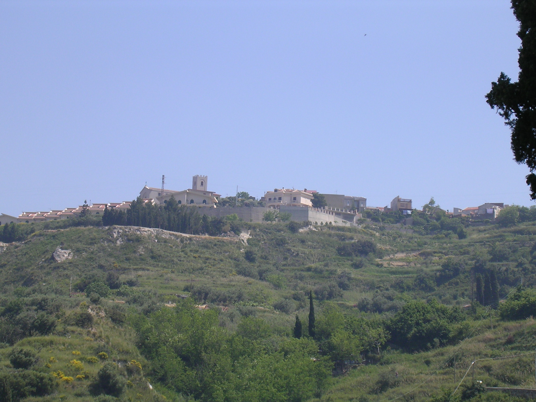 Comune Villafranca Tirrena fraz. Serro (foto By Riccardo Ramuglia)